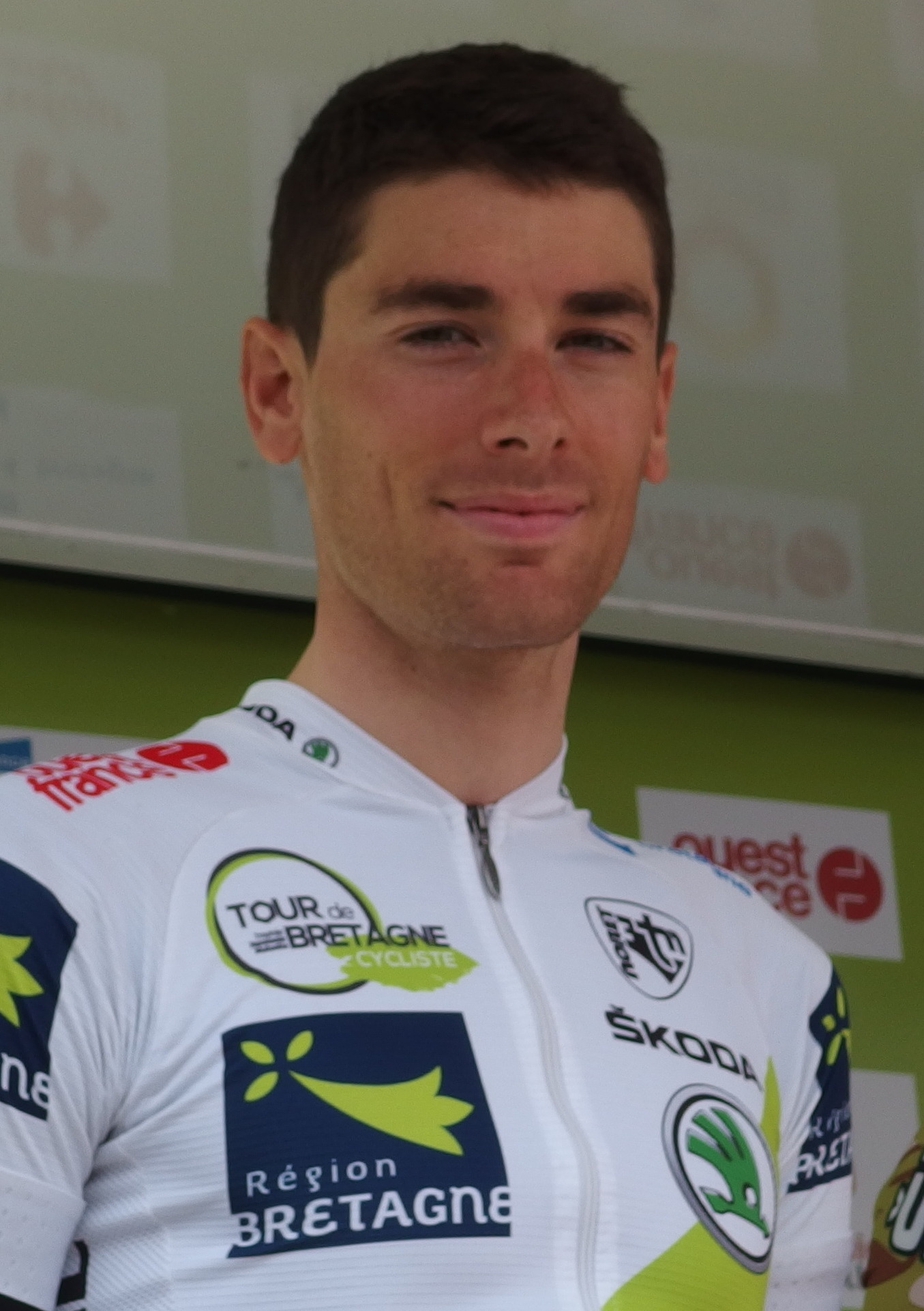 Tour de Bretagne 2014 - Présentation des équipes au départ de la sixième étape à Radenac - Équipe Armée de Terre Depicted person: Yann Guyot